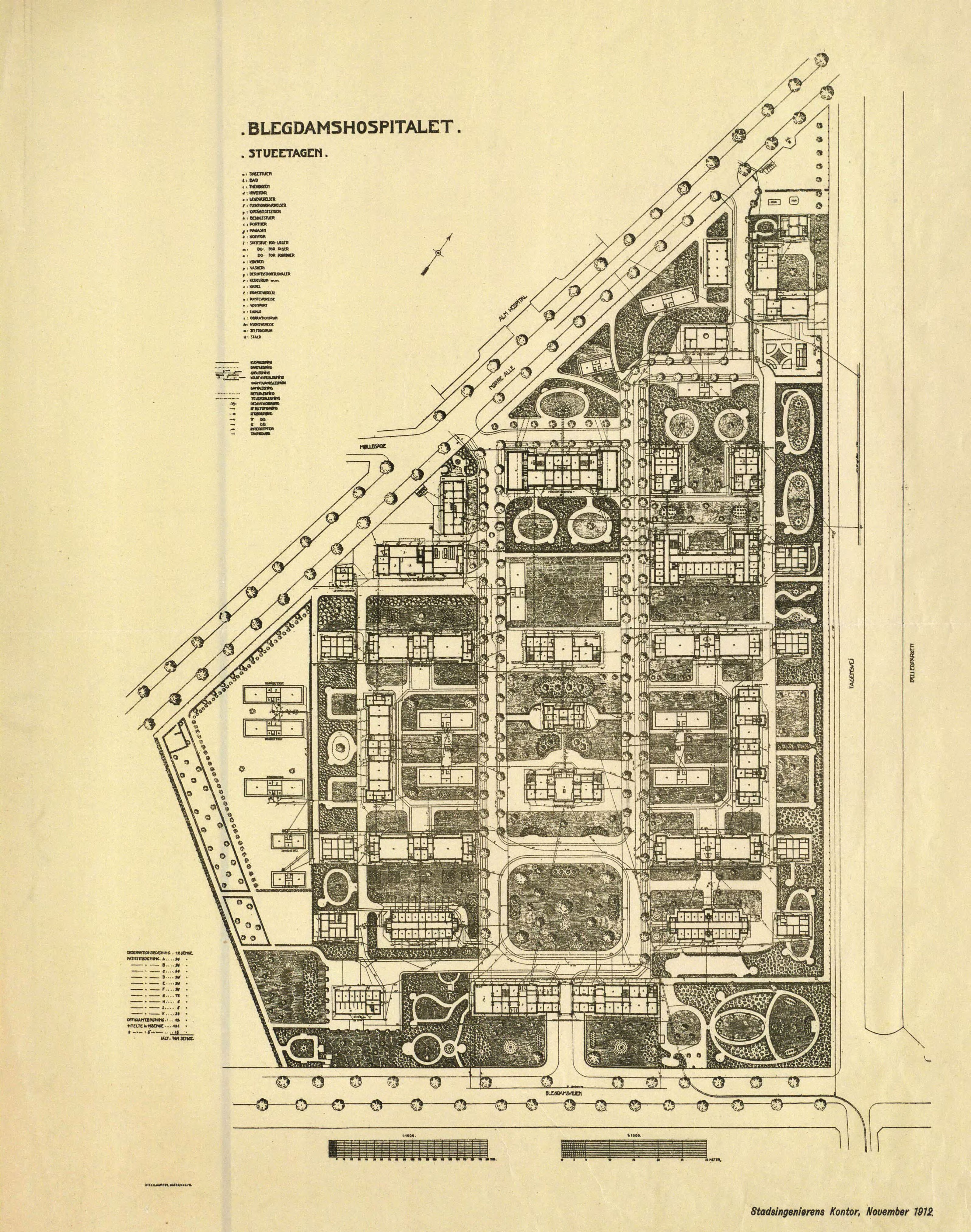 Plan over Blegdamshospitalet